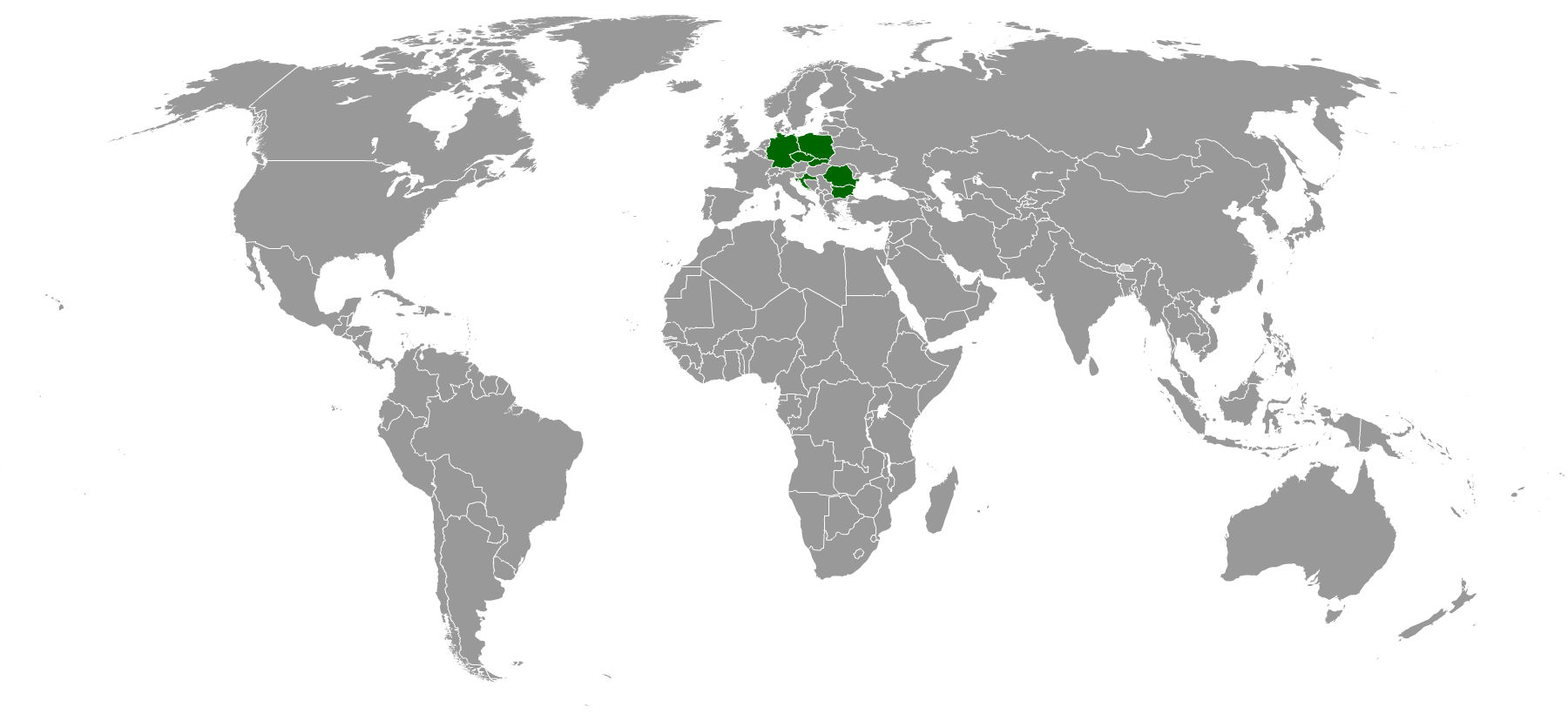 Kaufland v roce 2018